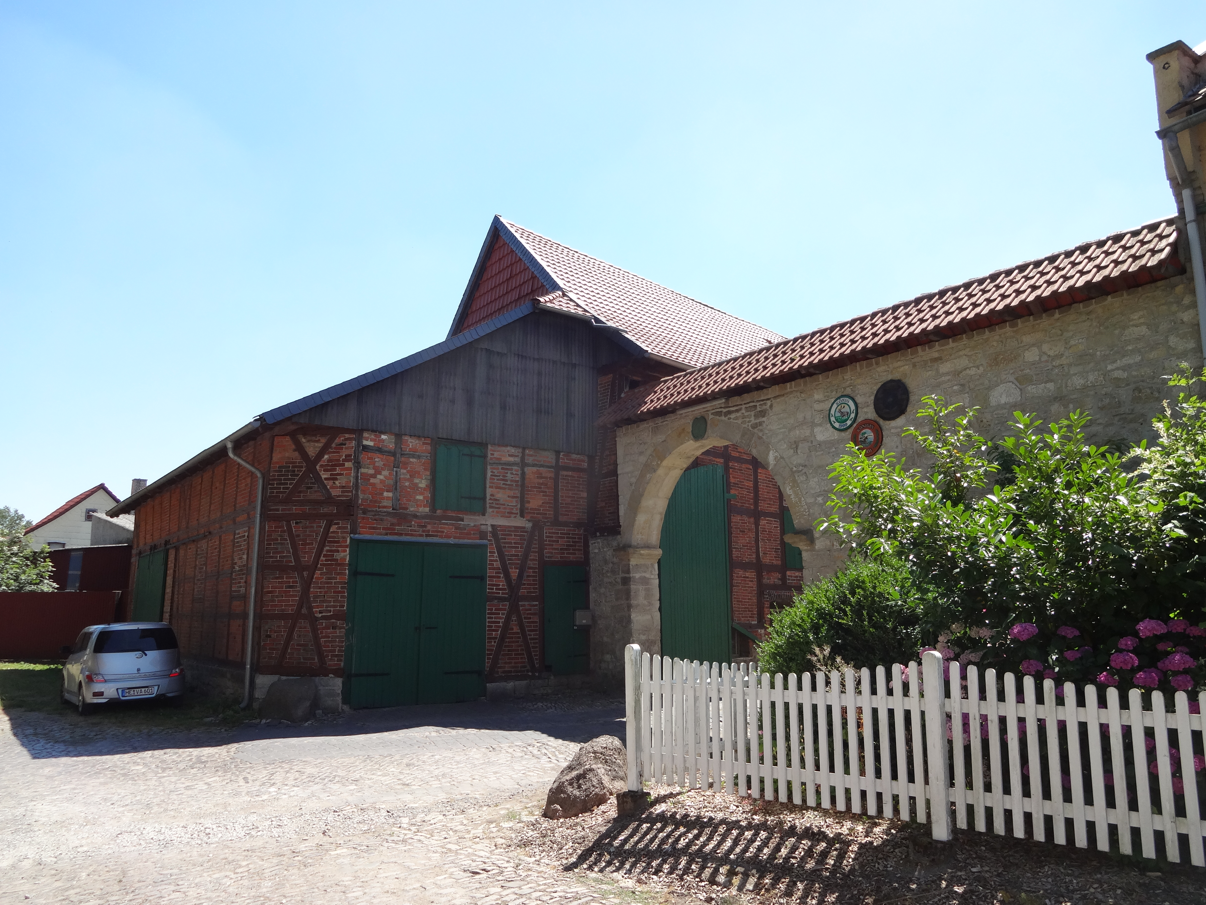 denkmalgeschütztes Bauernhaus in der Im Straße Winkel 1 in Dedeleben